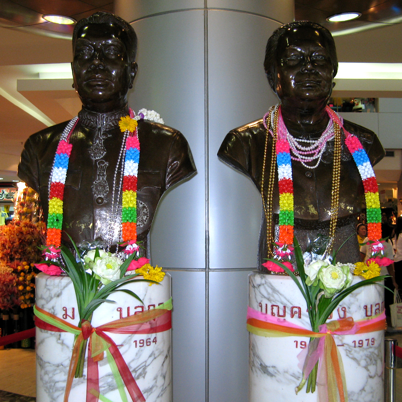 Bustes de Mah et Boonkhrong, les parents de l'architecte Chokchai Bulakul, instigateur de MBK Center à Bangkok. Photographie par Christophe COAT